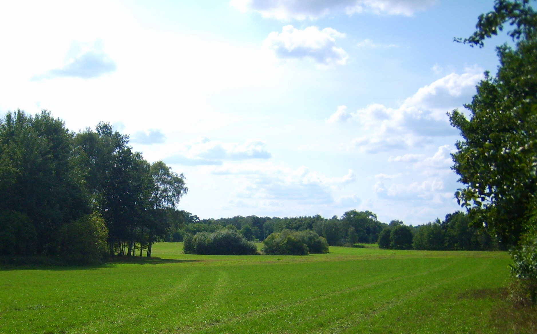 Das Naturschutzgebiet Kleine Wiesen - An den Horsten bei Kahla.